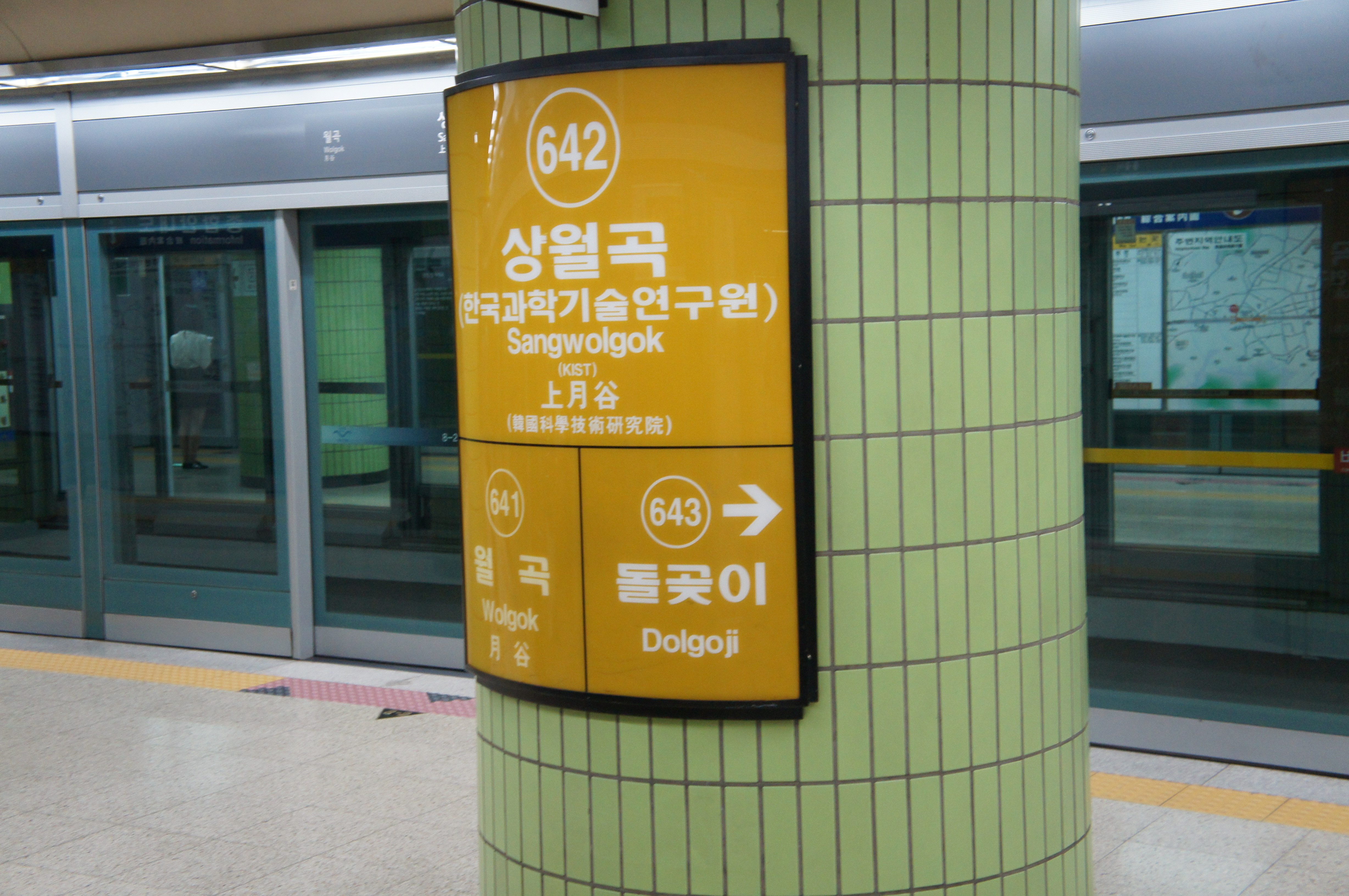 상월곡역 역명판